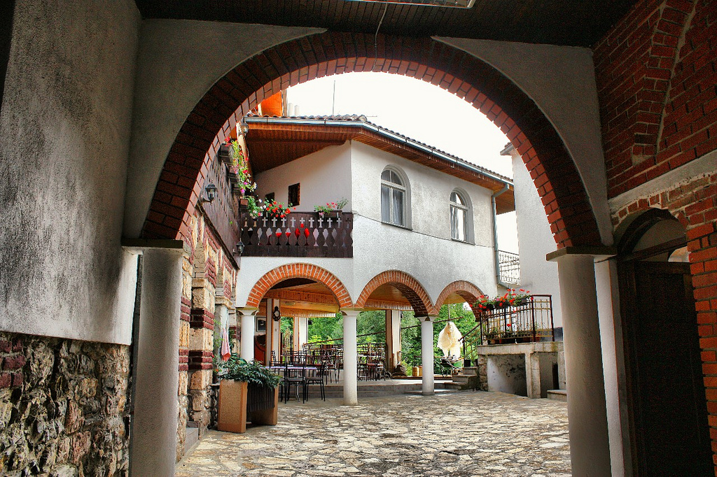 Манастирът Света Петка във Велгощи, Република Македония.